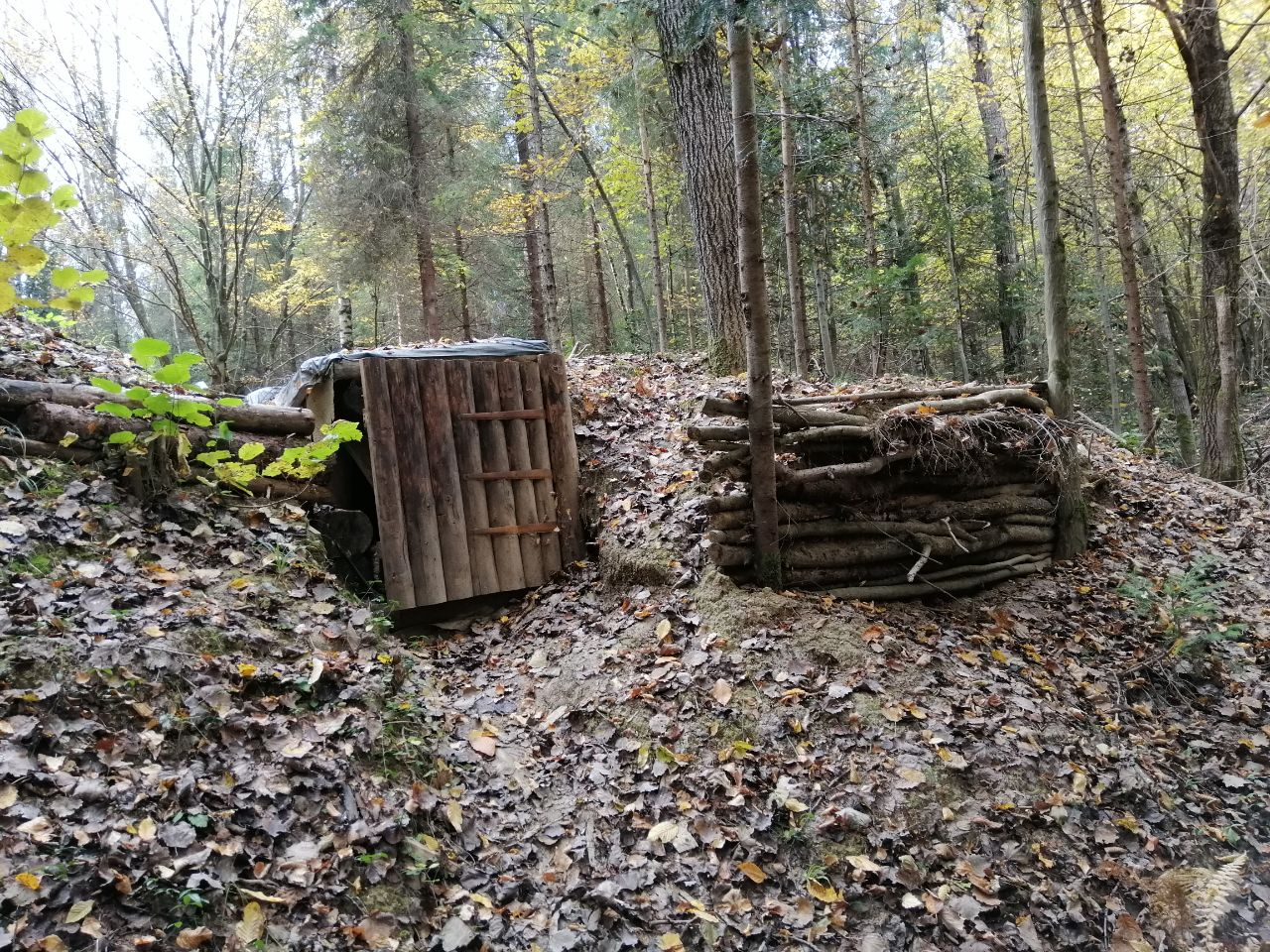 Фотографія